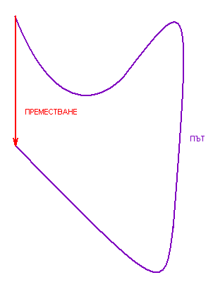 Разлика между път и преместване.